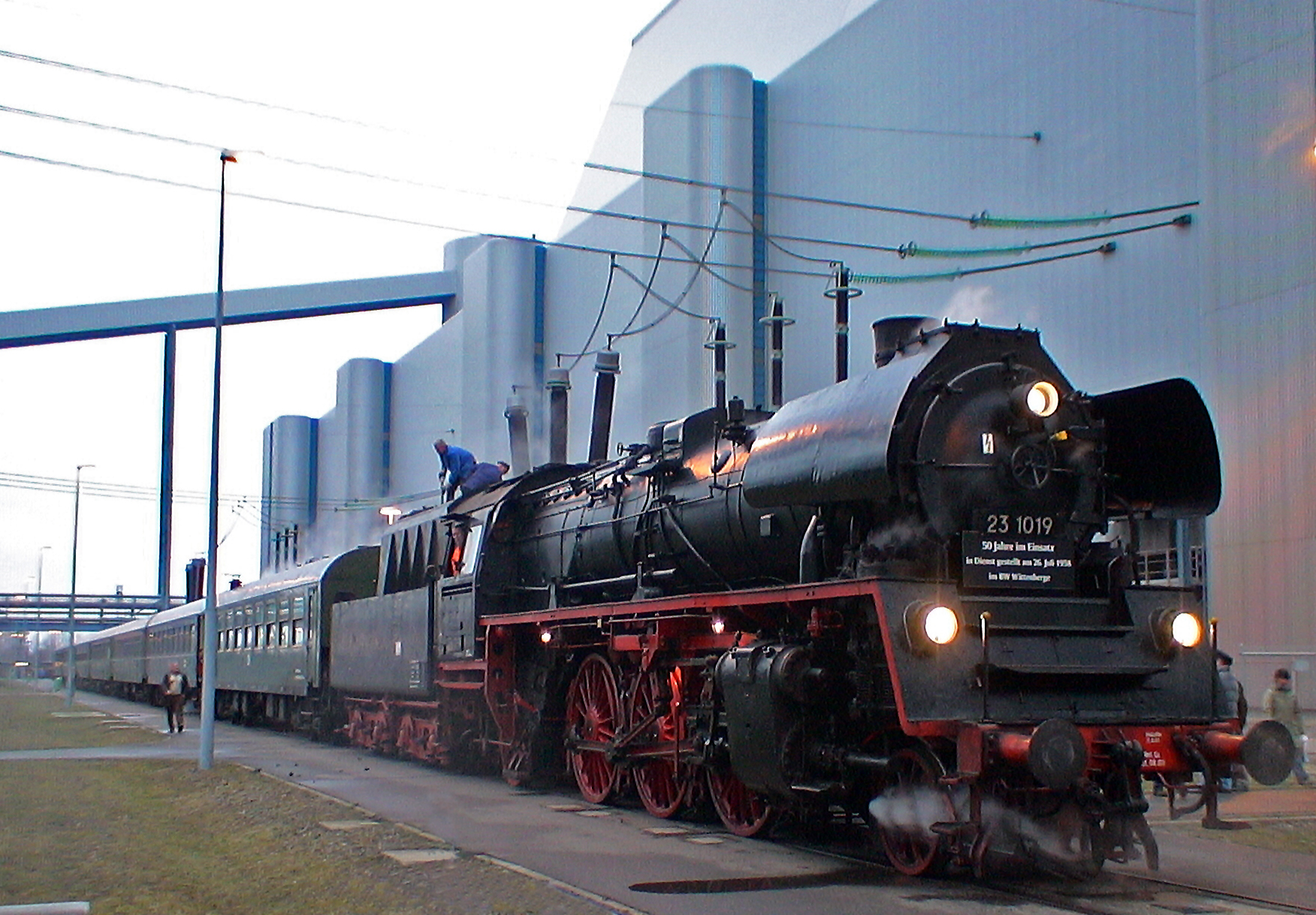 Dampflok 35 1019 des Lausitzer Dampflokclub Cottbus im Vattenfall Europe Kraftwerk Schwarze Pumpe.